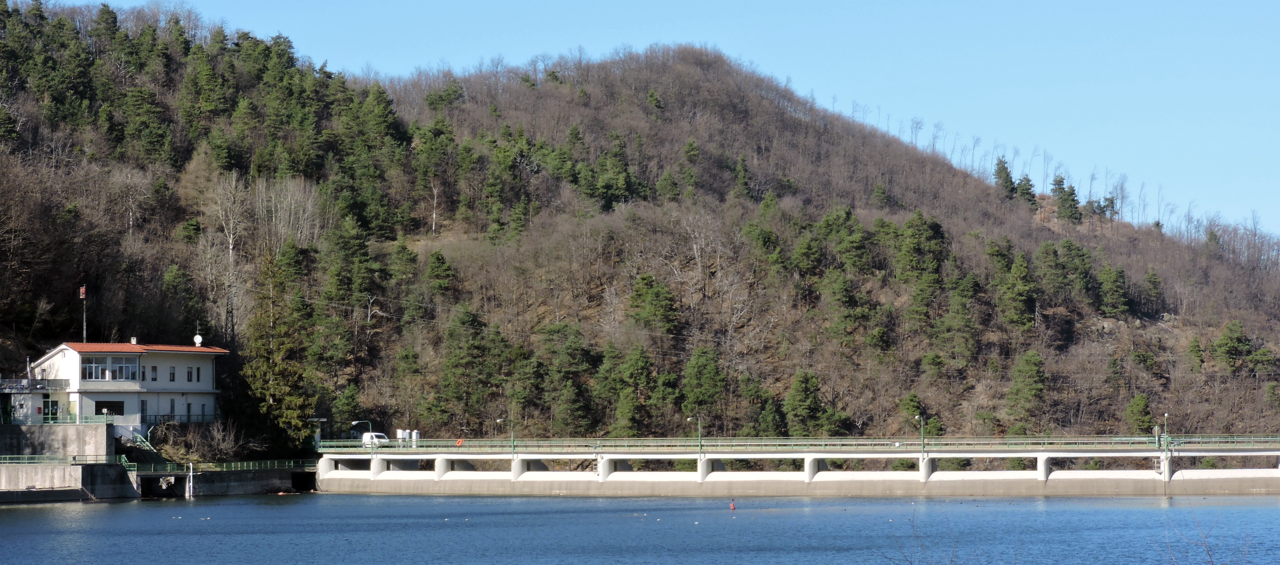 Lago di Osiglia (Q47508263)